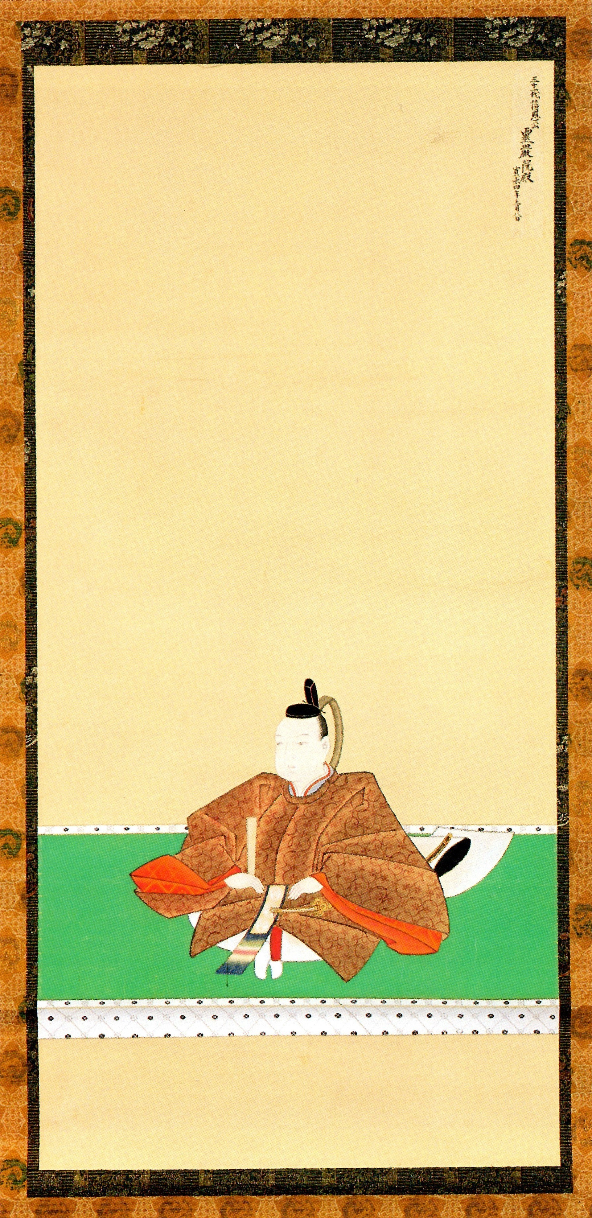 南部信恩の肖像。